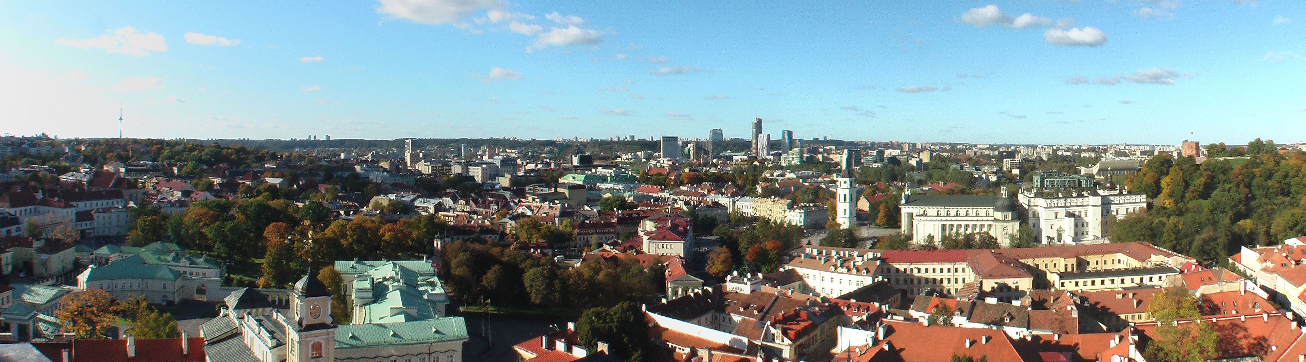 Vilnius Altstadt-Panorama